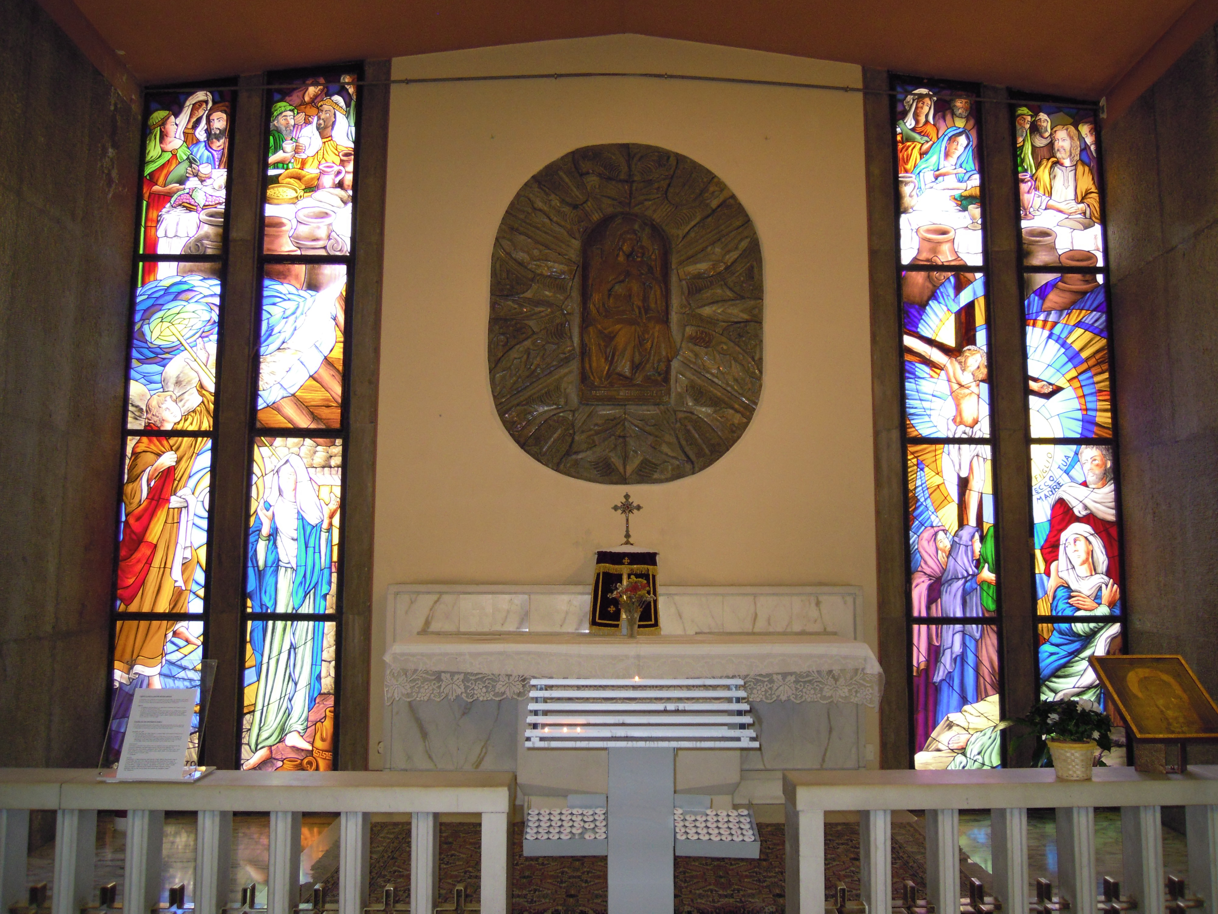 La Cappella della Mater Misericordiæ (terza di destra) della chiesa di San Pio X.